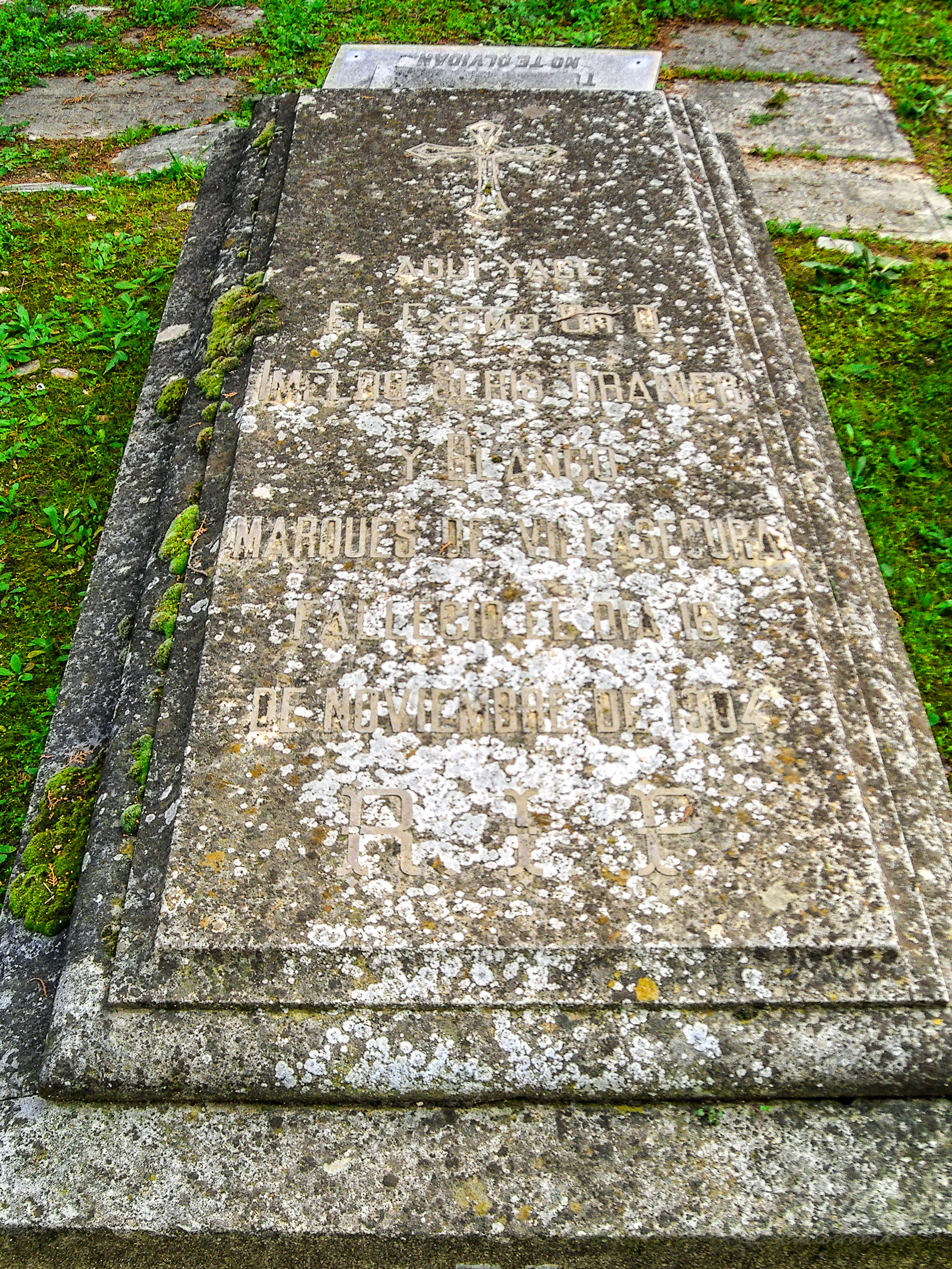 Sacramental San Lorenzo y San Jose